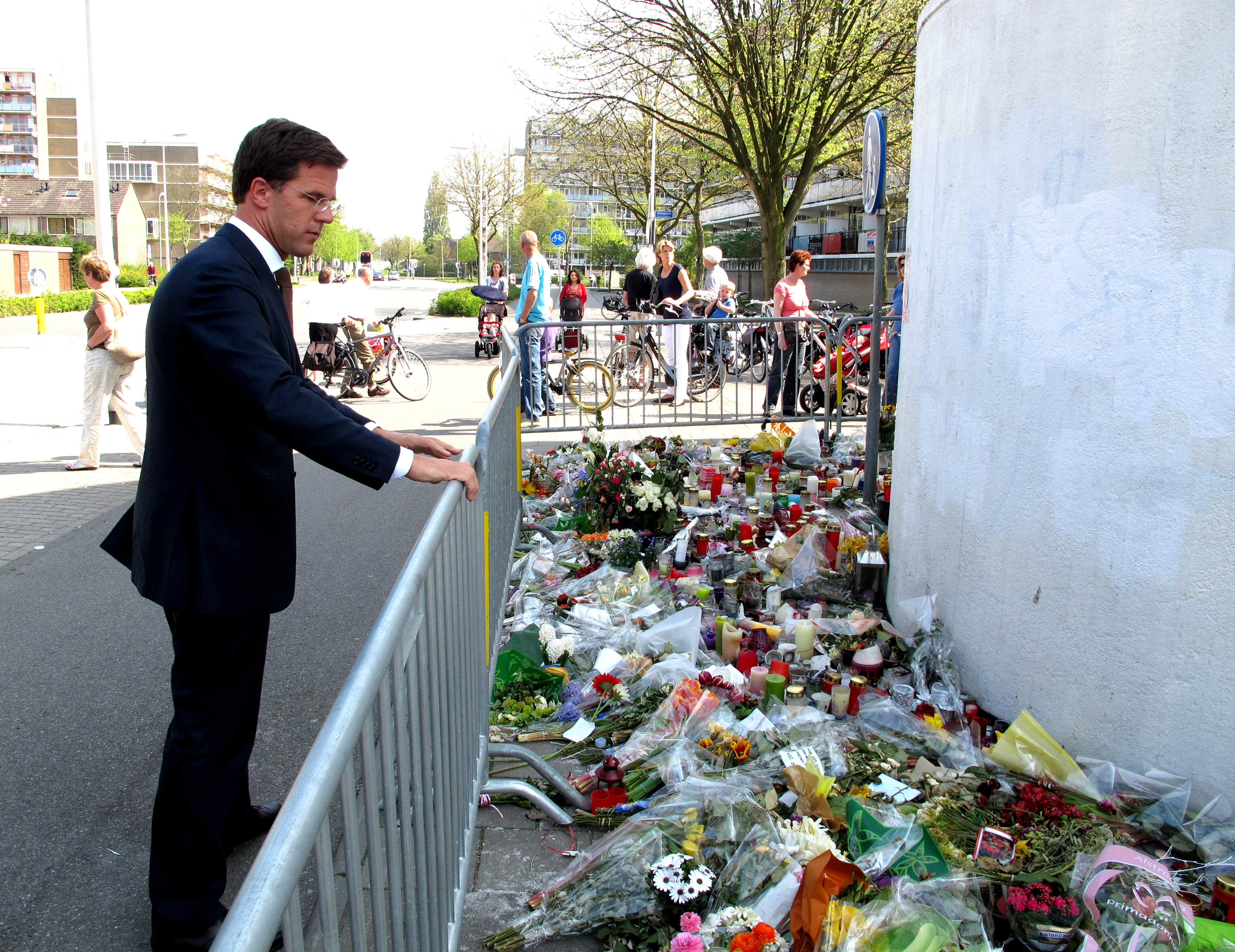 De minister-president Mark Rutte staat na afloop van de herdenkingsbijeenkomst stil bij de bloemenzee voor het winkelcentrum de Ridderhof in Alphen aan den Rijn.